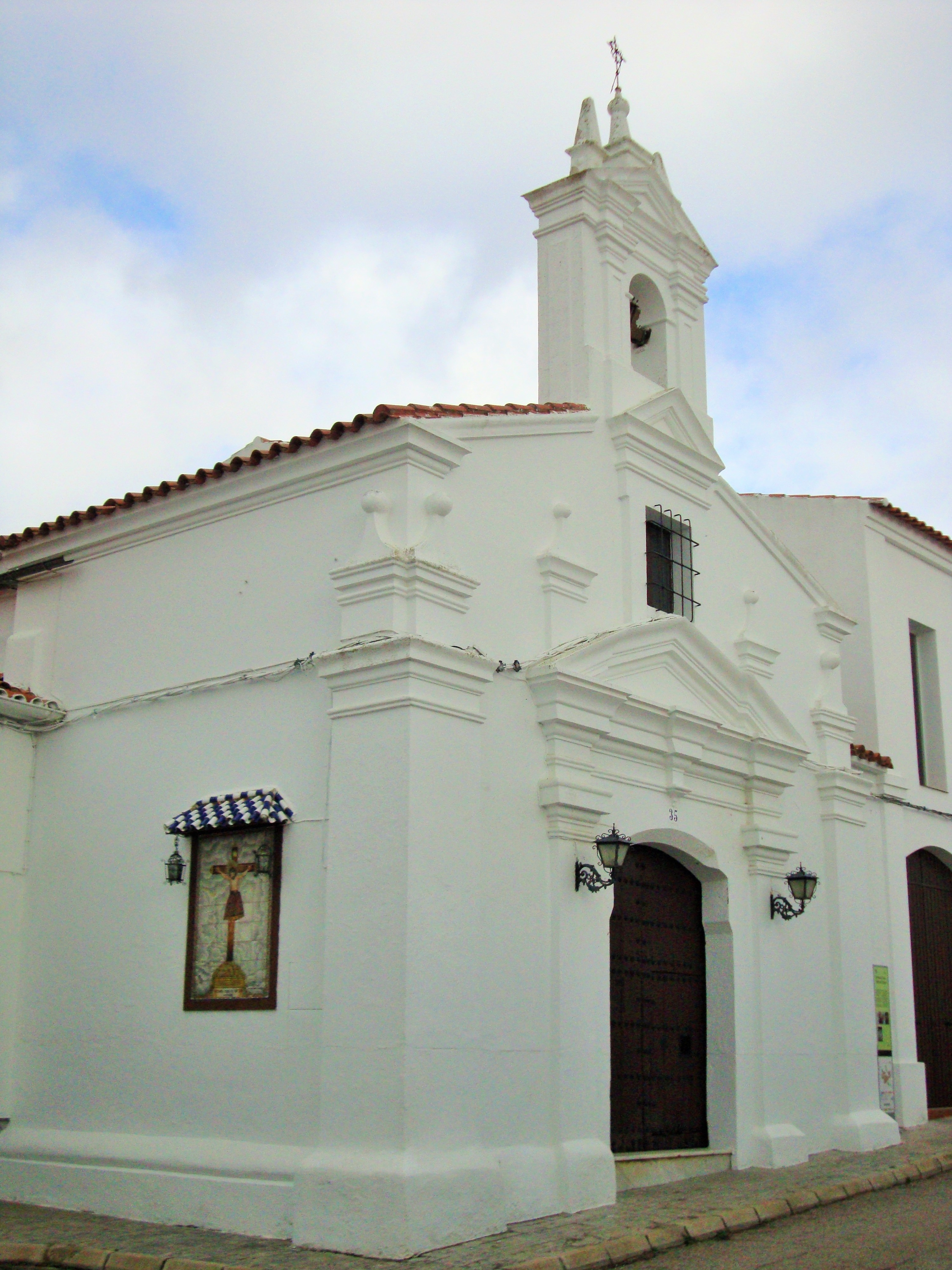 Iglesia nueva de Ahillones